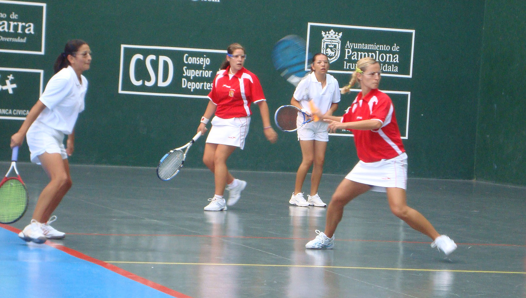 Foto tomada durante un partido de frontenis femenino 30 metros pelota olimpica durante un partido de la fase de grupos de la liguilla de la IV Copa del Mundo de Fronton 30 metros.